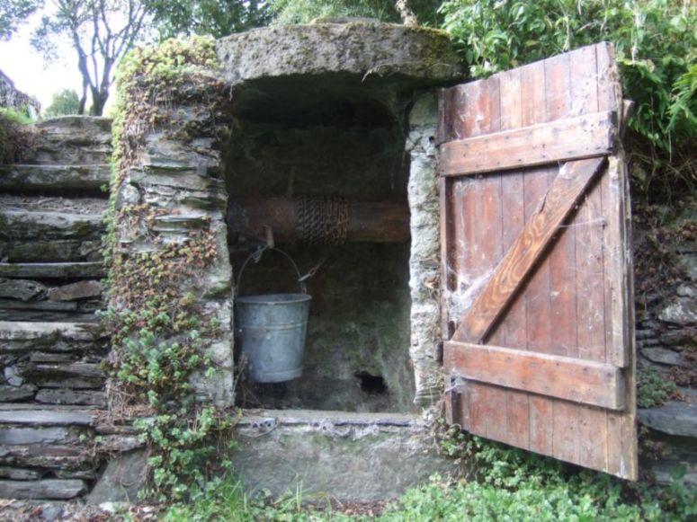 Brunnen bei dem Geburtshaus Stefan Andres, Dhrönchen bei Trittenheim